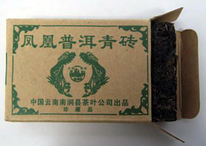 雲南南澗県茶葉公司のプーアル茶。